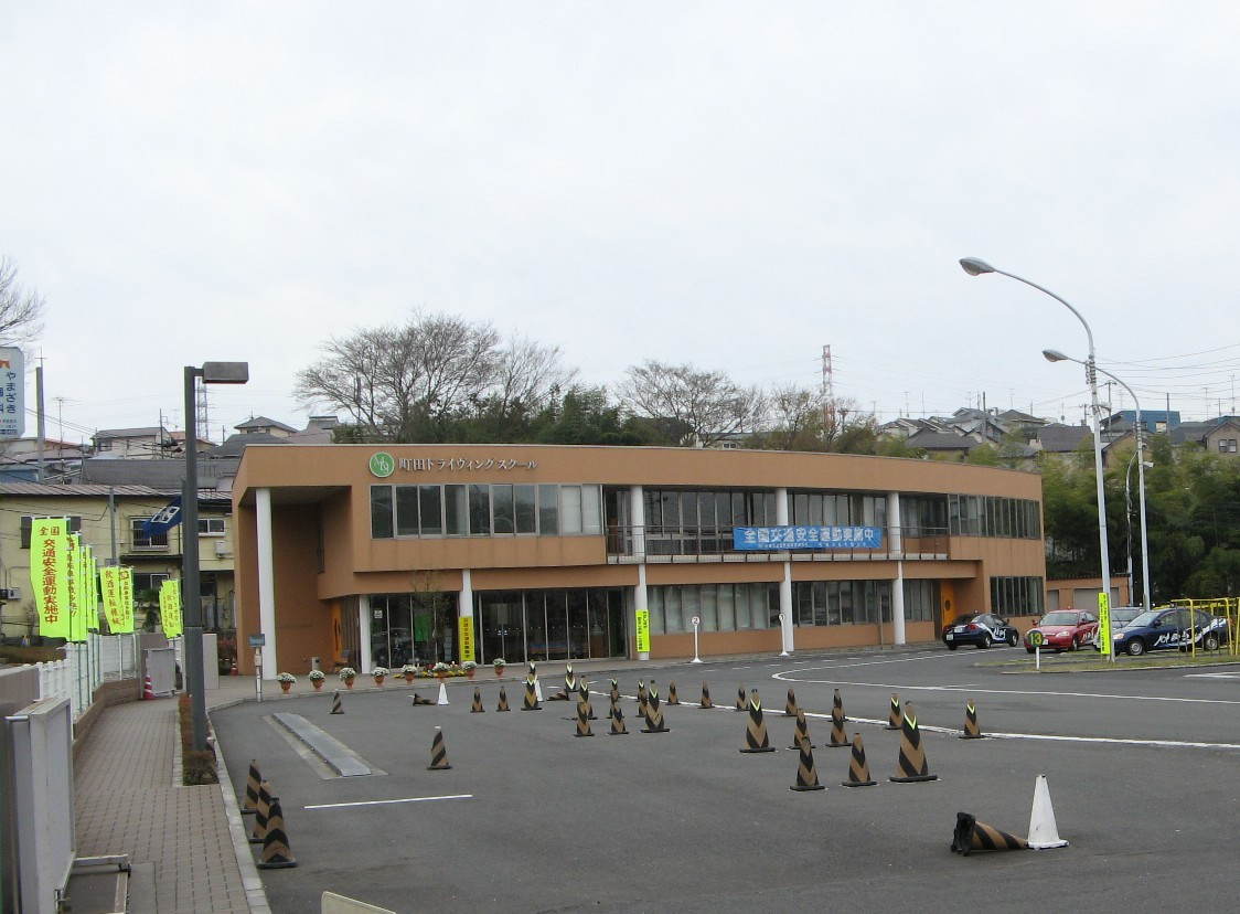 国際興業町田ドライヴィングスクールの社屋。公道上より撮影。